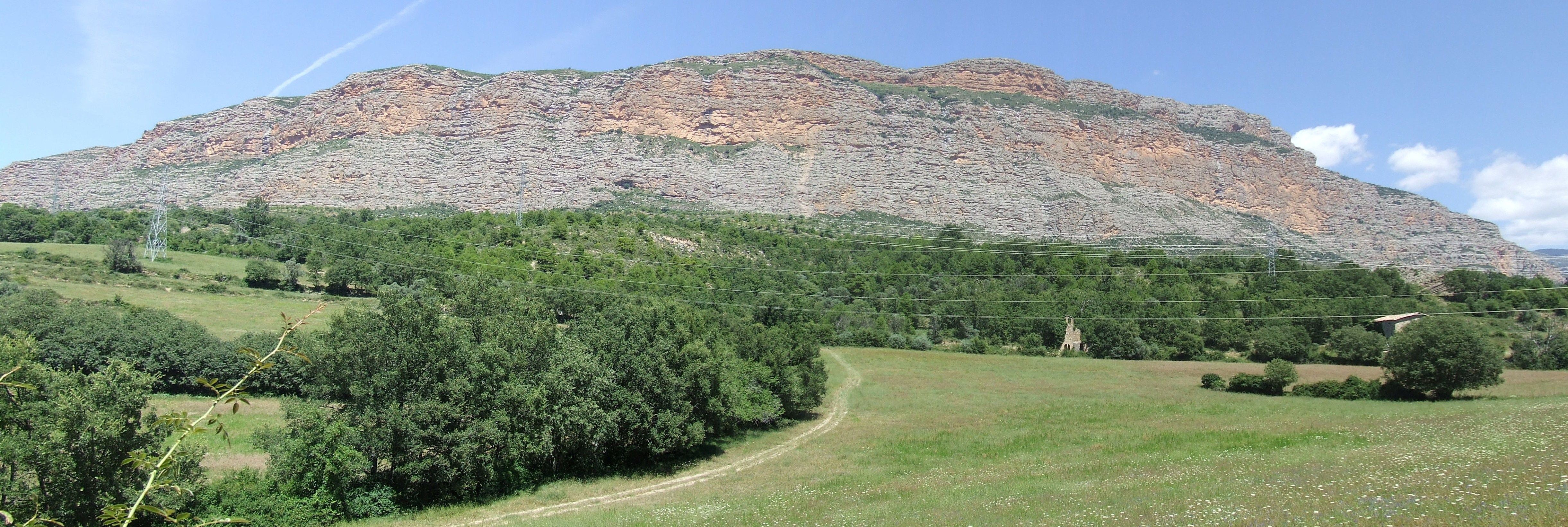 Panoràmica del Mas de Vilanova (Hortoneda de la Conca, Conca de Dalt, Pallars Jussà)